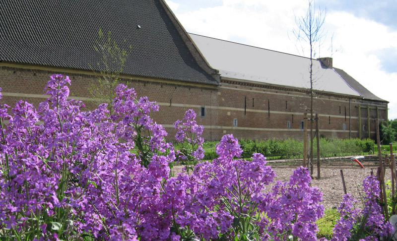 Kruidentuin Herkenrode. Foto ter beschikking gesteld door Herkenrode vzw aan